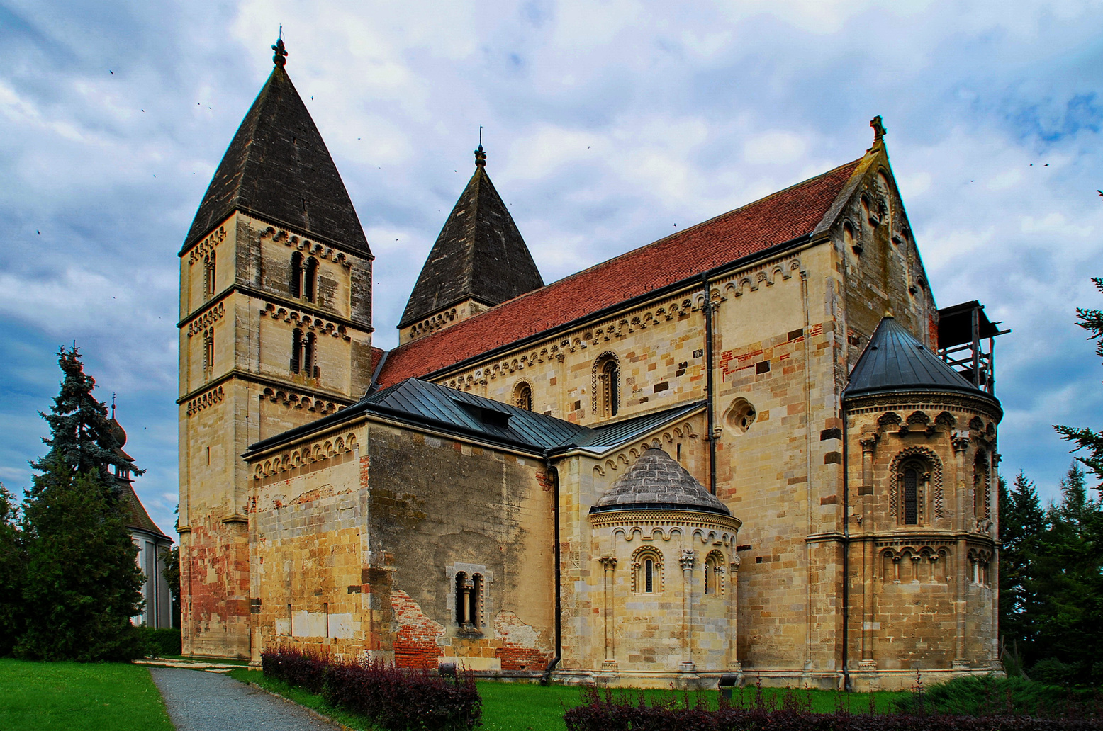 Apátsági templom (Ják, Szabadnép u.) This is a photo of a monument in Hungary. Identifier: 8941